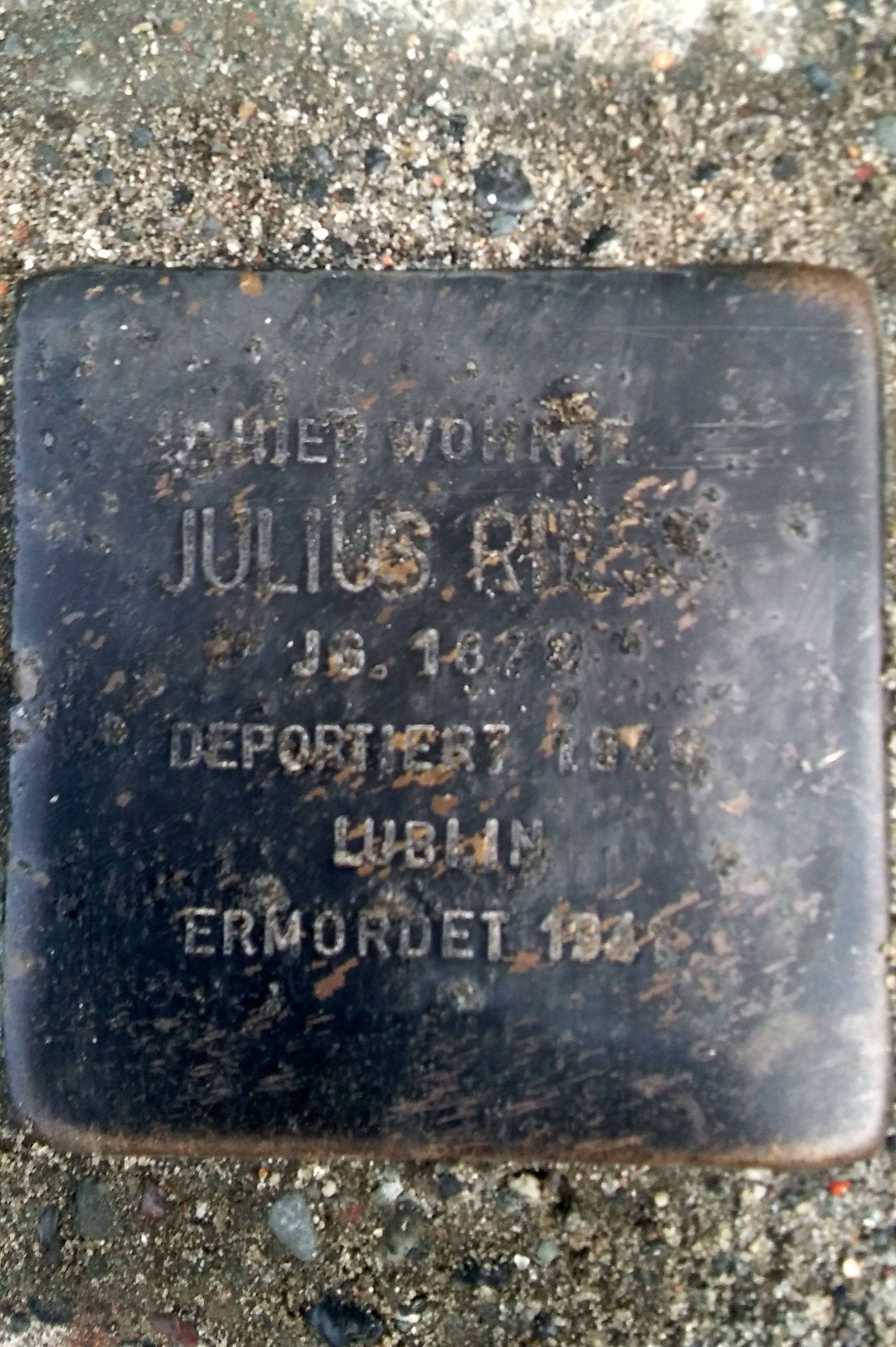 Stralsund, Tribseer Damm 54, Stolperstein Julius Riess